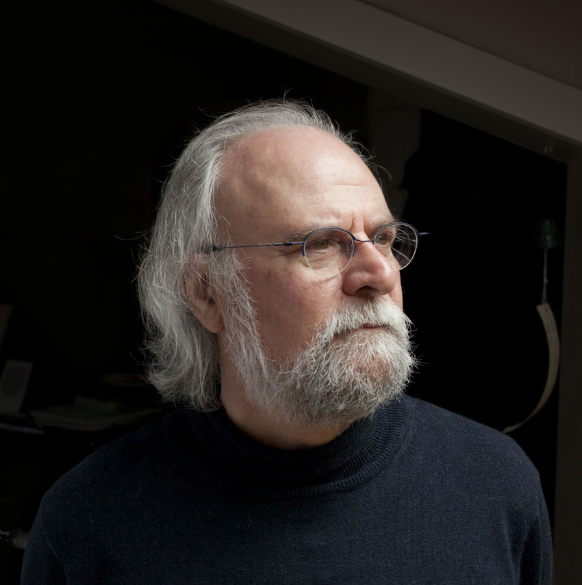 portret